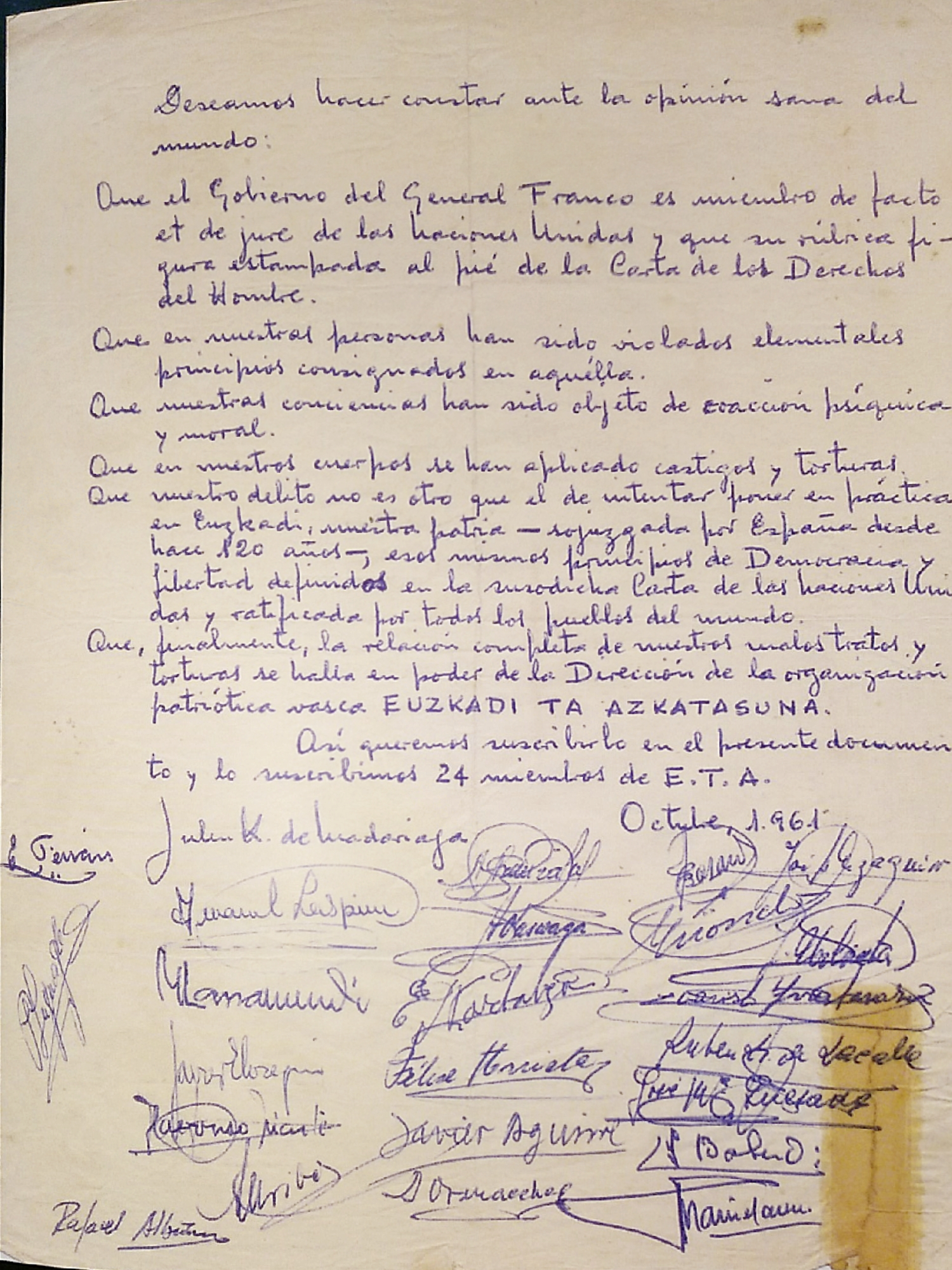 Manuscrito original escrito por los presos y enviado a la prensa. Extraído del libro "ETA, una historia en imágenes", pero no susceptible de tener copyright, al ser una comunicación pública realizada por una organización ilegal.